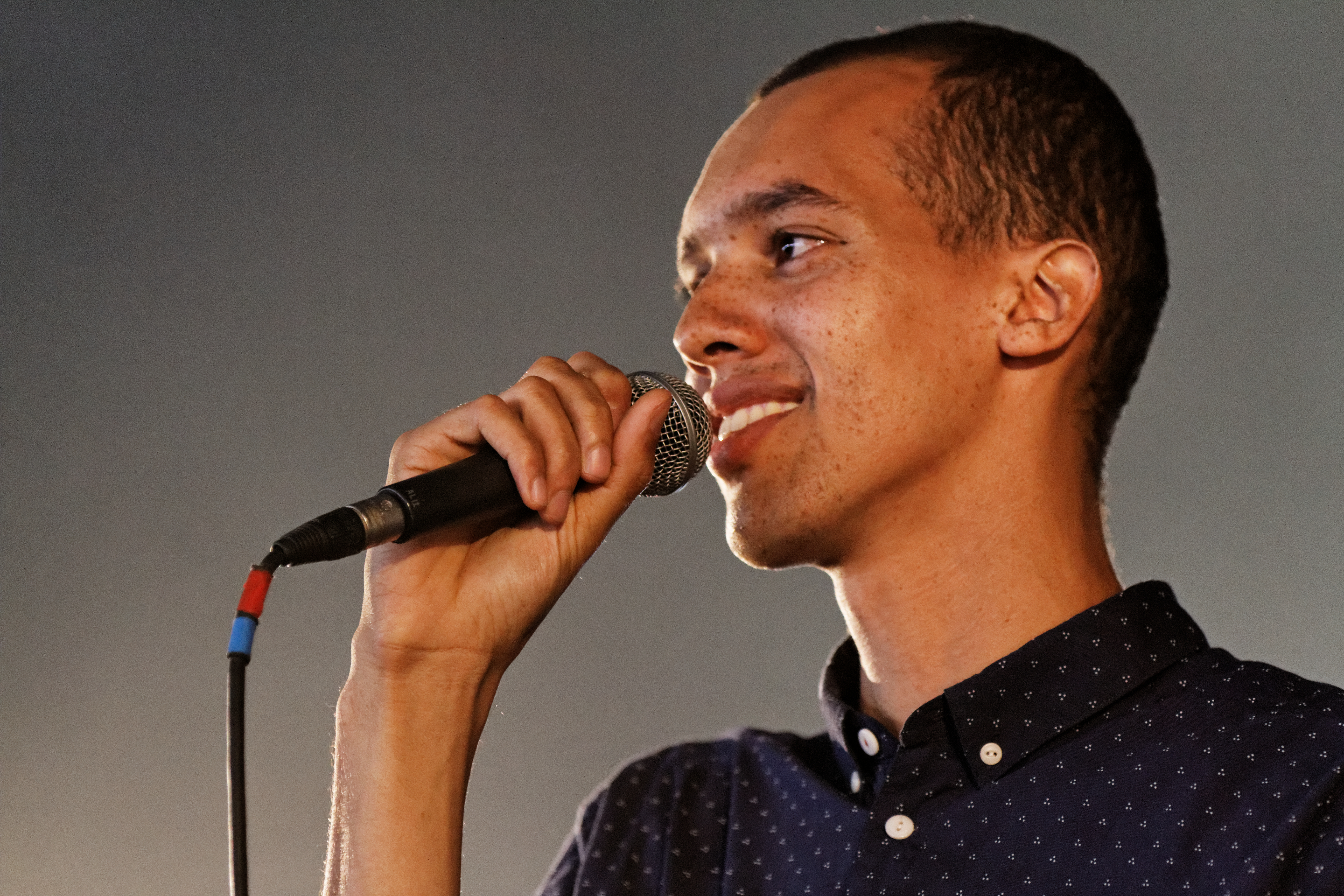 Gaël Faye en concert sur la scène Cabaret lors du festival du bout du Monde à Crozon dans le Finistère (France).